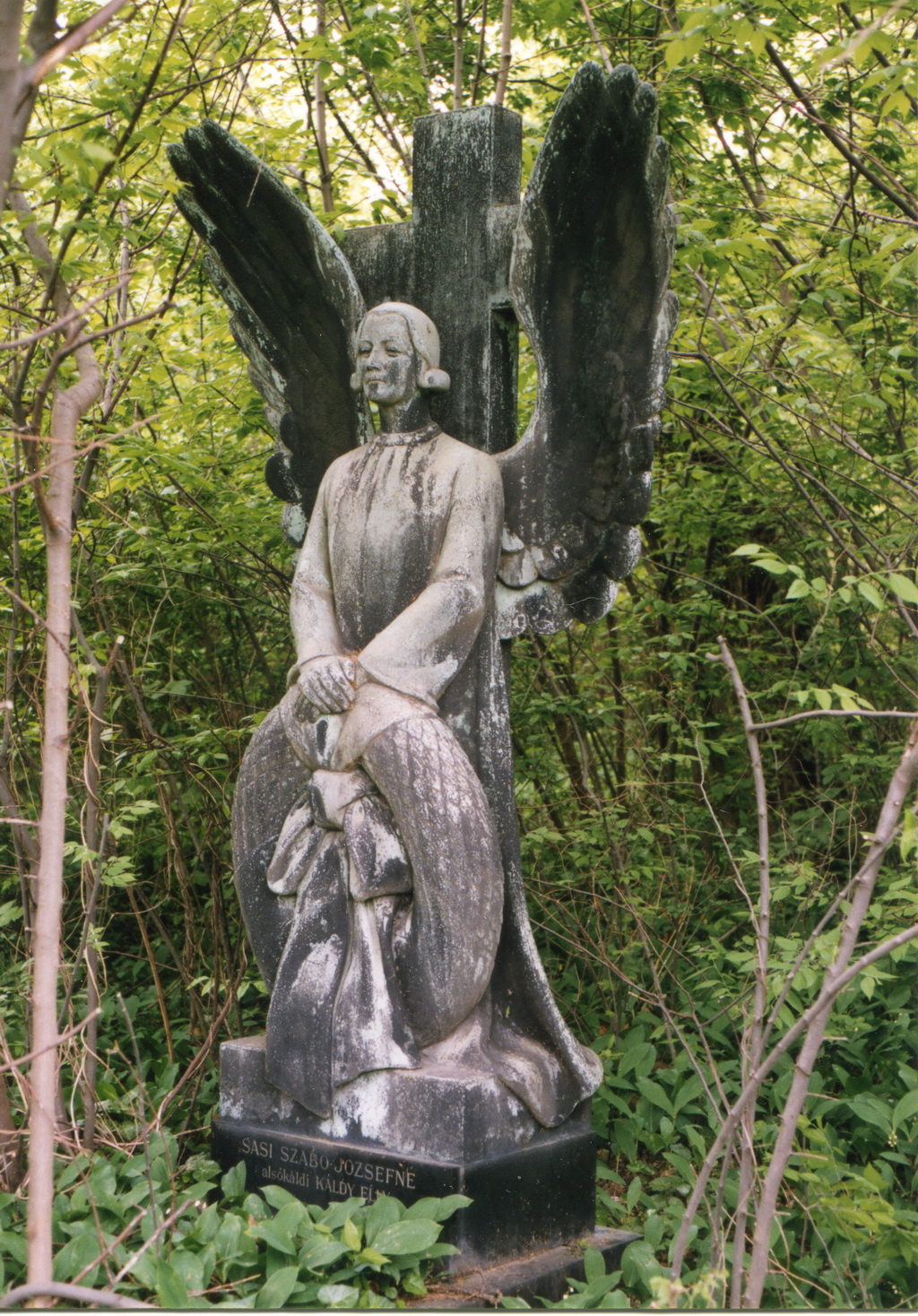 Vastagh László: Sasi Szabó Józsefné síremléke (1940), Kerepesi temető